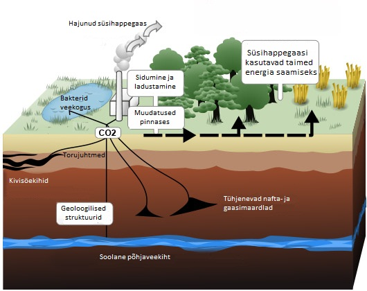 Illustreeriv pilt süsihappegaasi sidumise ja ladustamise kohta